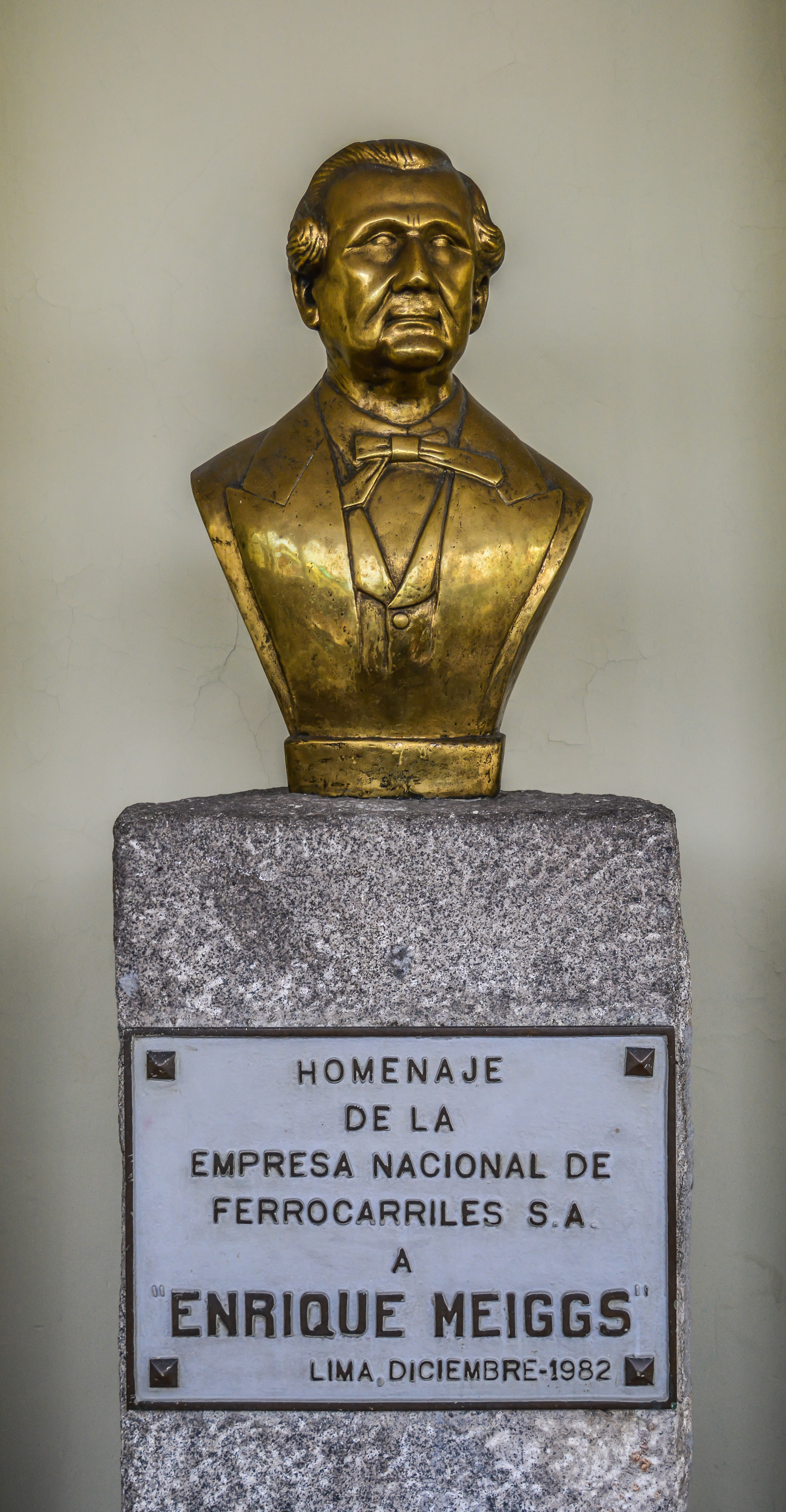 Busto a Enrique Meiggs, Estación de Desamparados, Lima, Perú